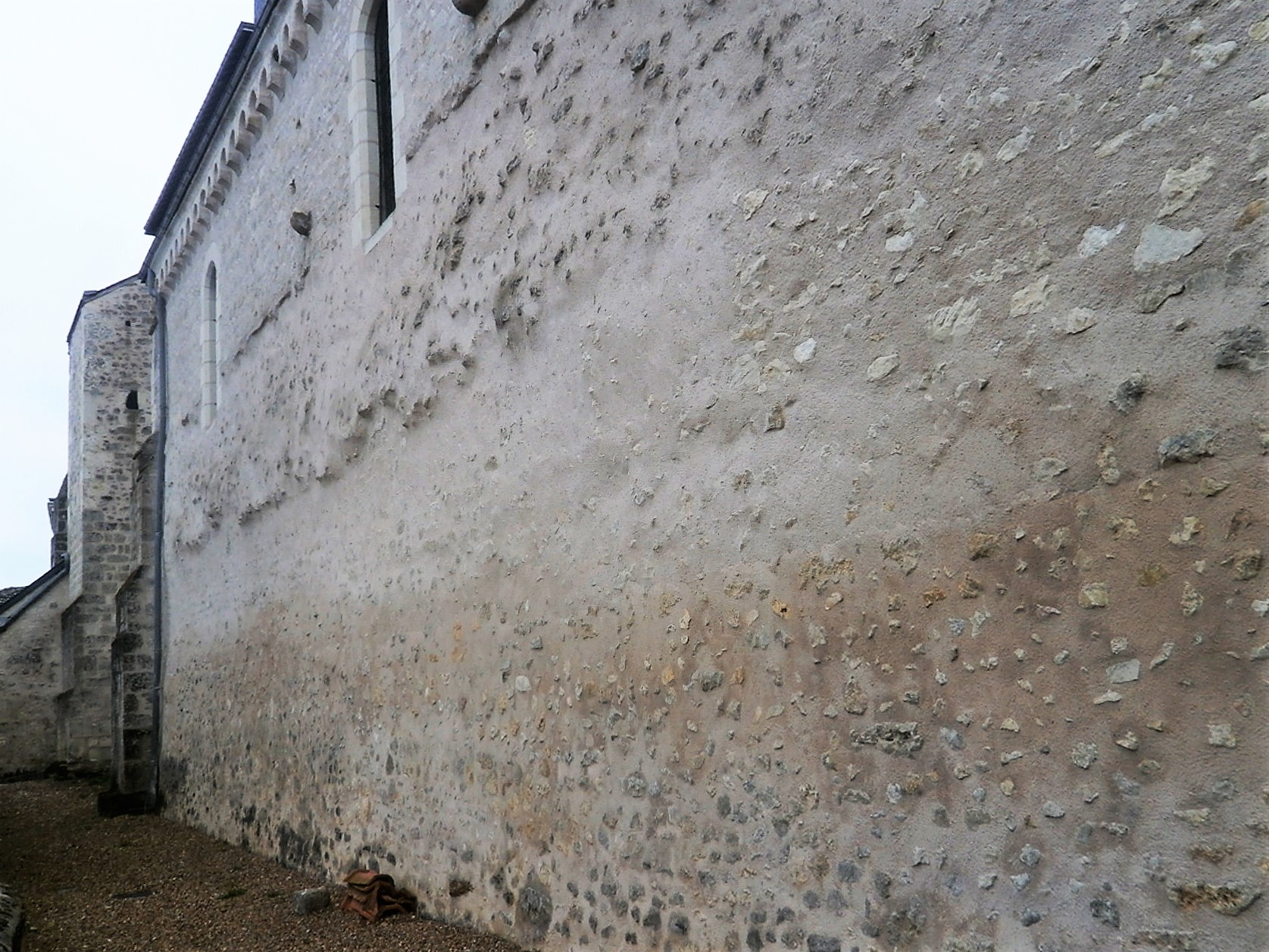 Mur nord de la nef de l'église Saint-Vincent d'Orbigny